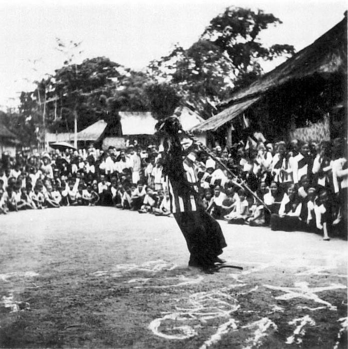 Repronegatief. Een Batak priester danst, onder toeziend oog van zijn dorpsgenoten, met zijn toverstaf boven op de grond getekende symbolen